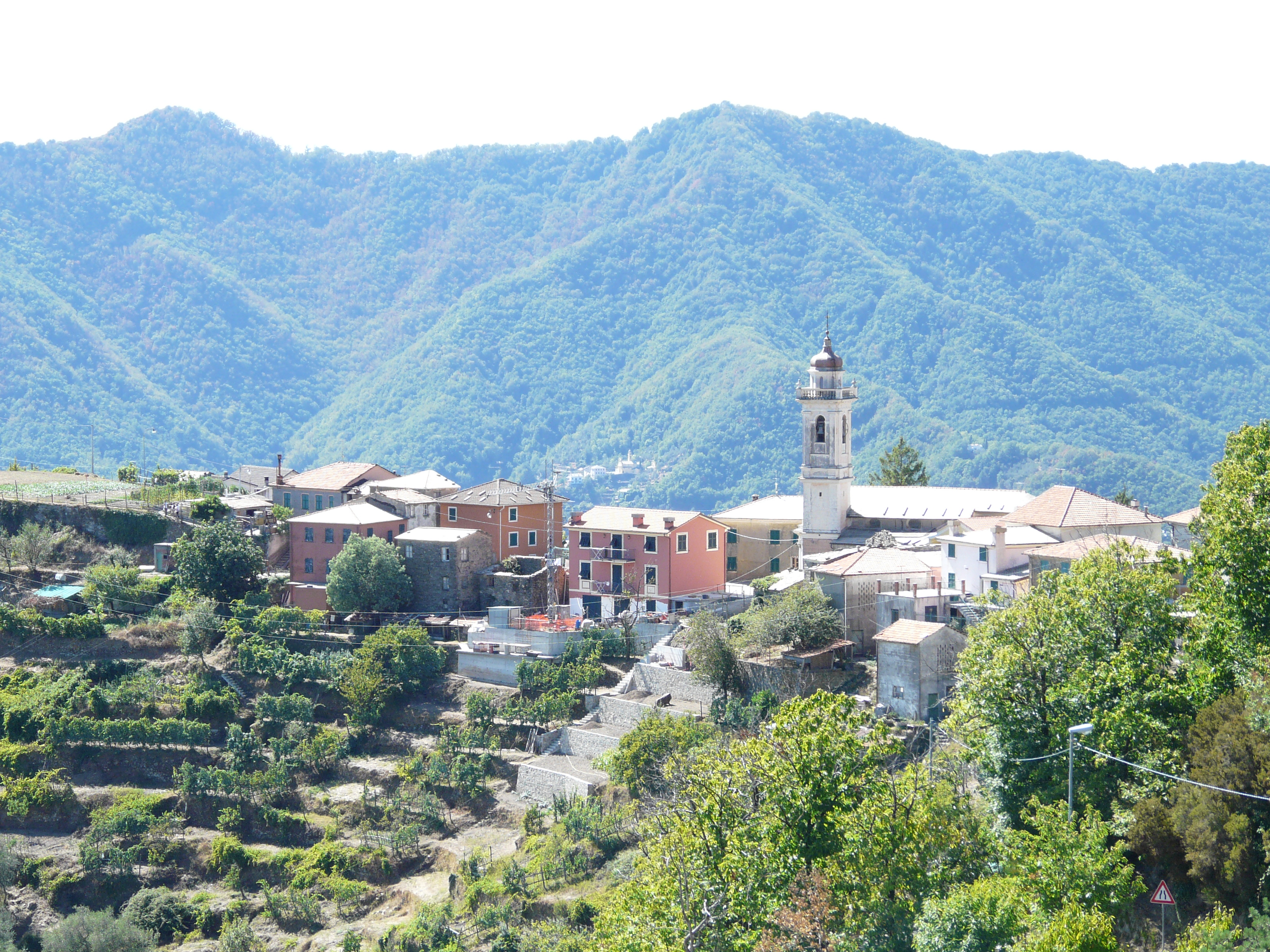 Romaggi, San Colombano Certenoli, Liguria, Italia